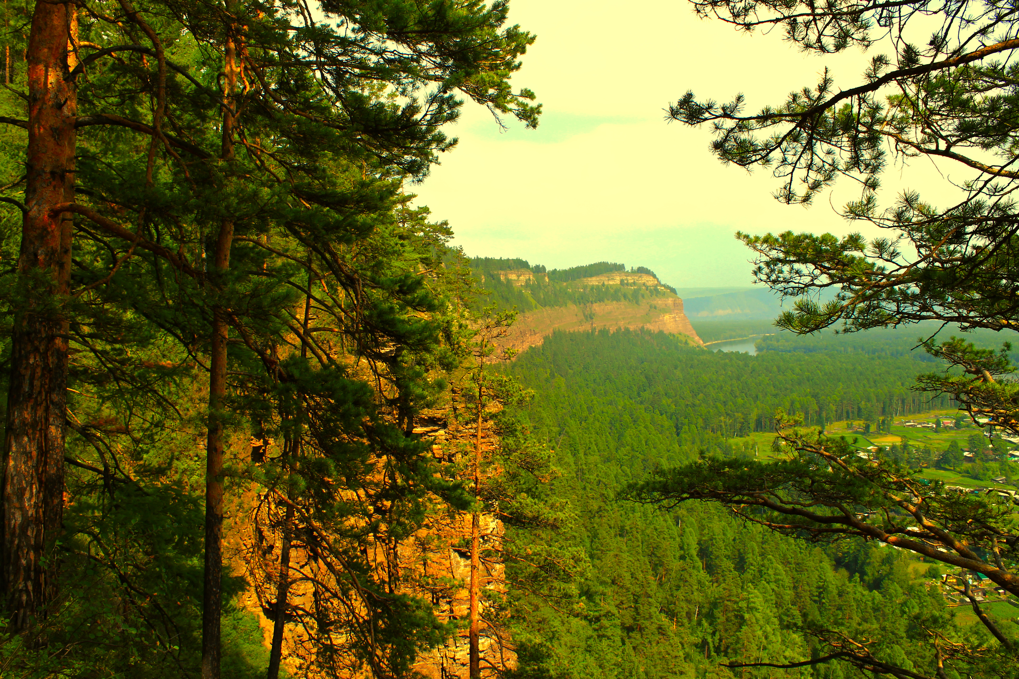 Утес Шаманский, Шелеховский район This image is related to the protected area of Russia number 3810474